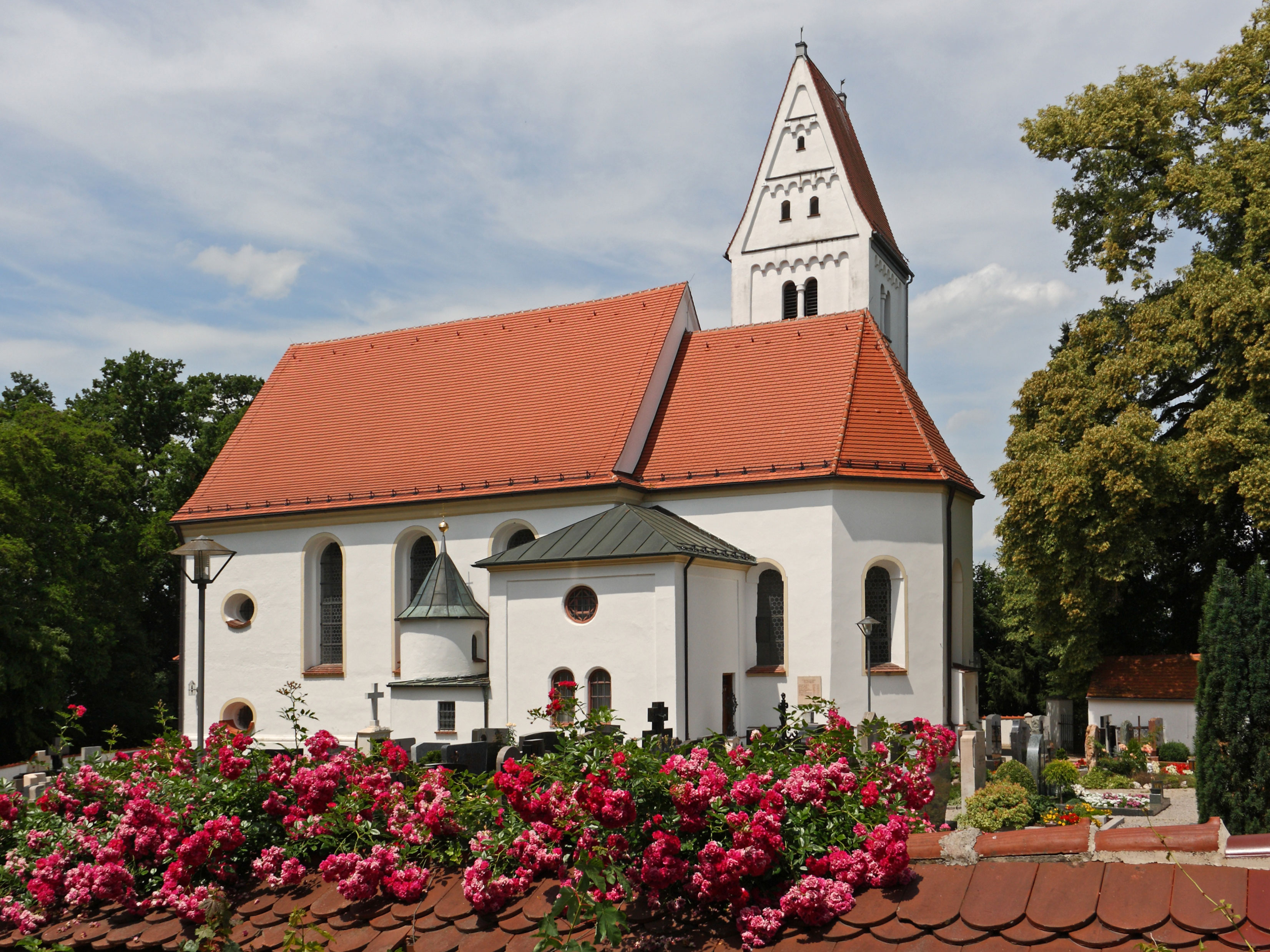 Kath. Pfarrkirche St. Fridolin in Ustersbach; Ansicht von Süden